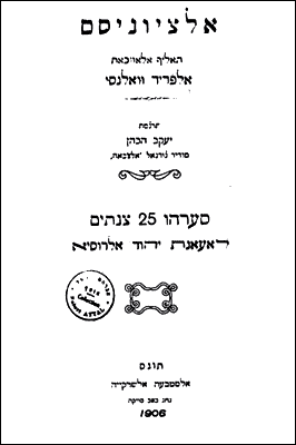 A Judeo-Arabic Zionist booklet in Tunisia (1906) by dr. Alferd Valensi